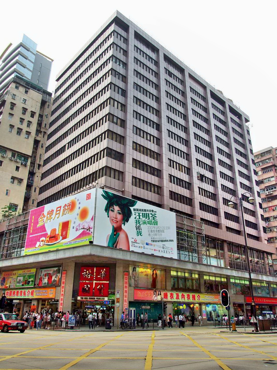 裕華國貨總店